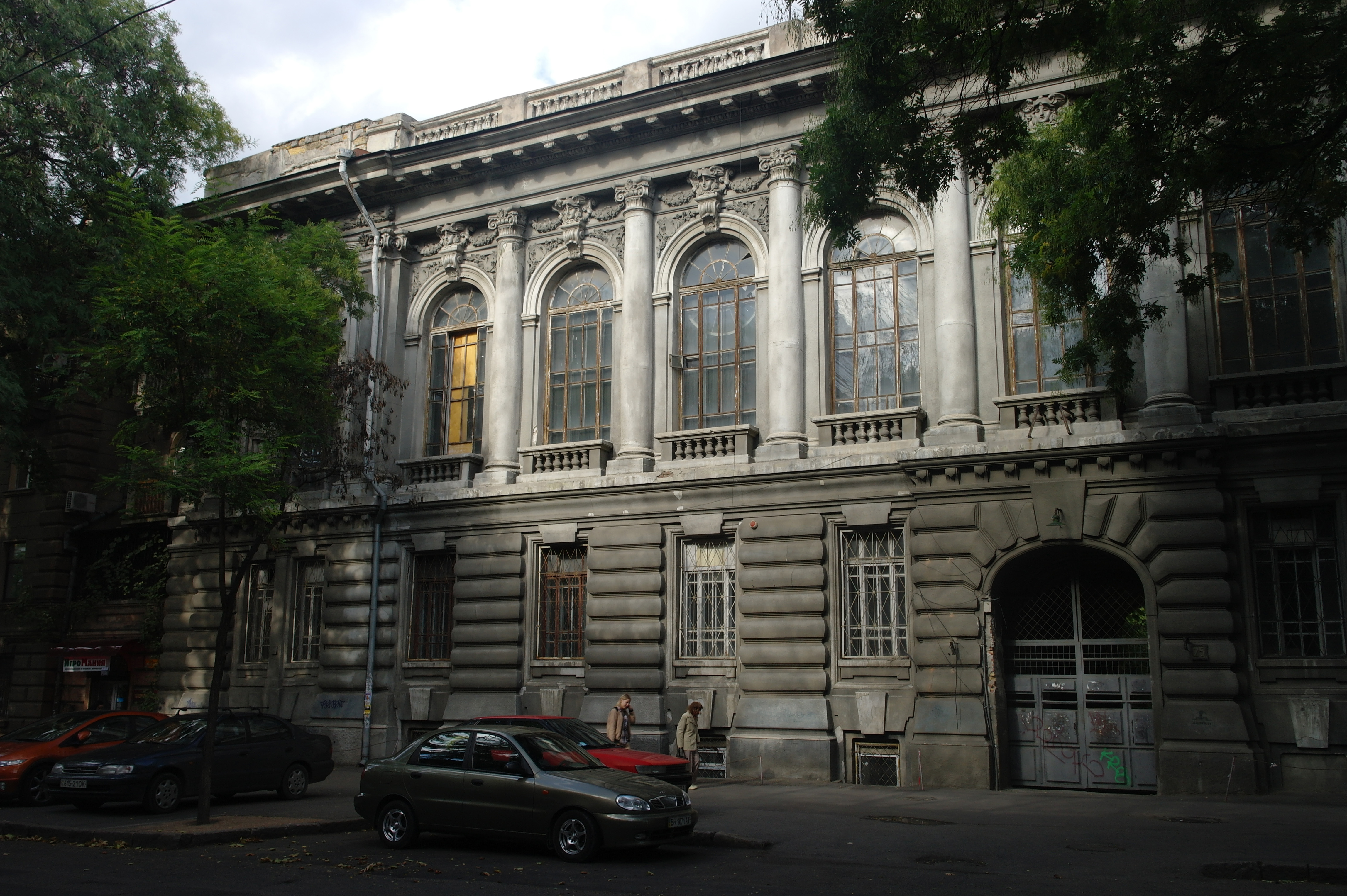 Одеса, Пастера, 25